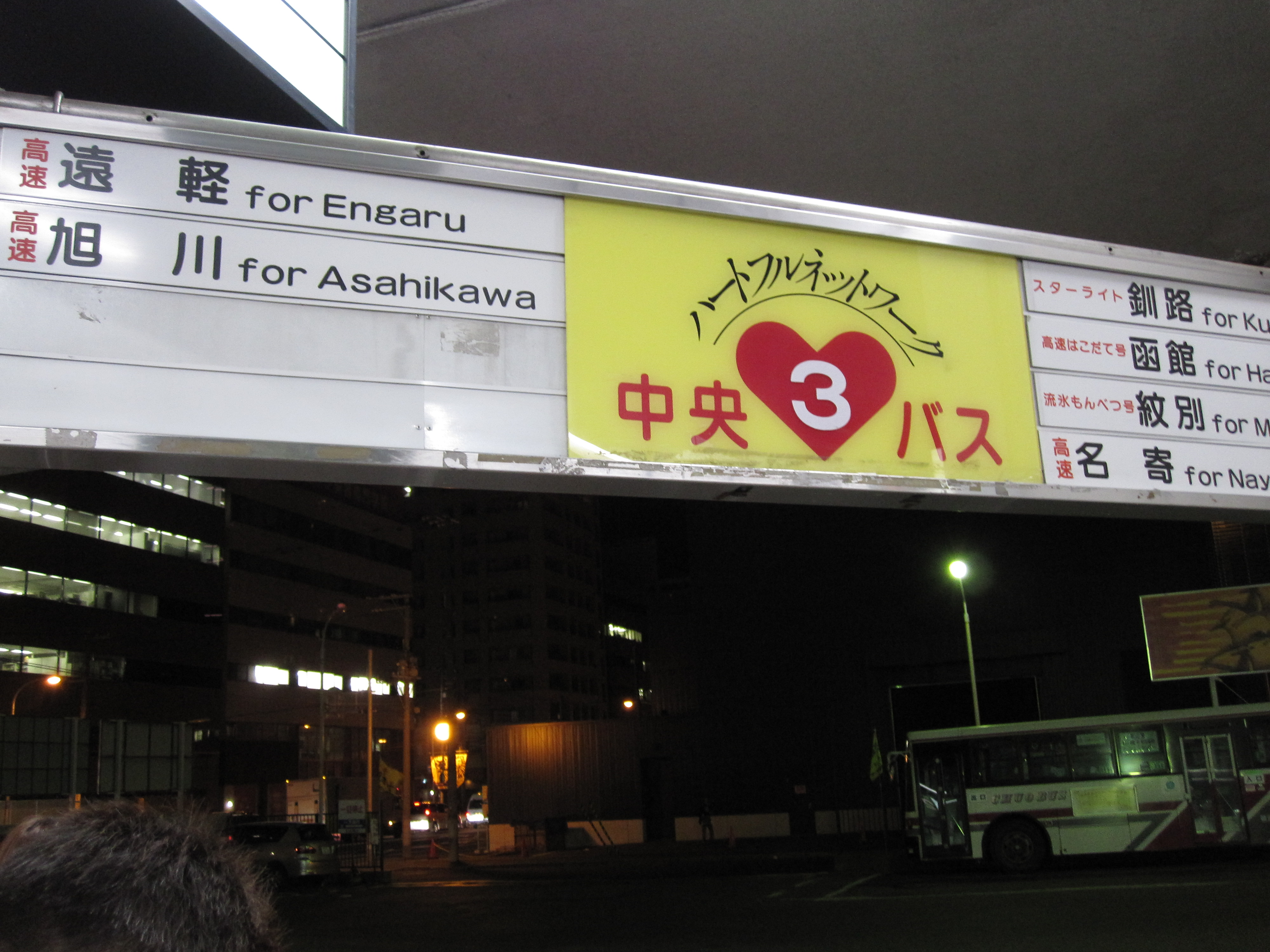 中央バス札幌ターミナル3番のりば、目の前には北海道四季劇場がある。